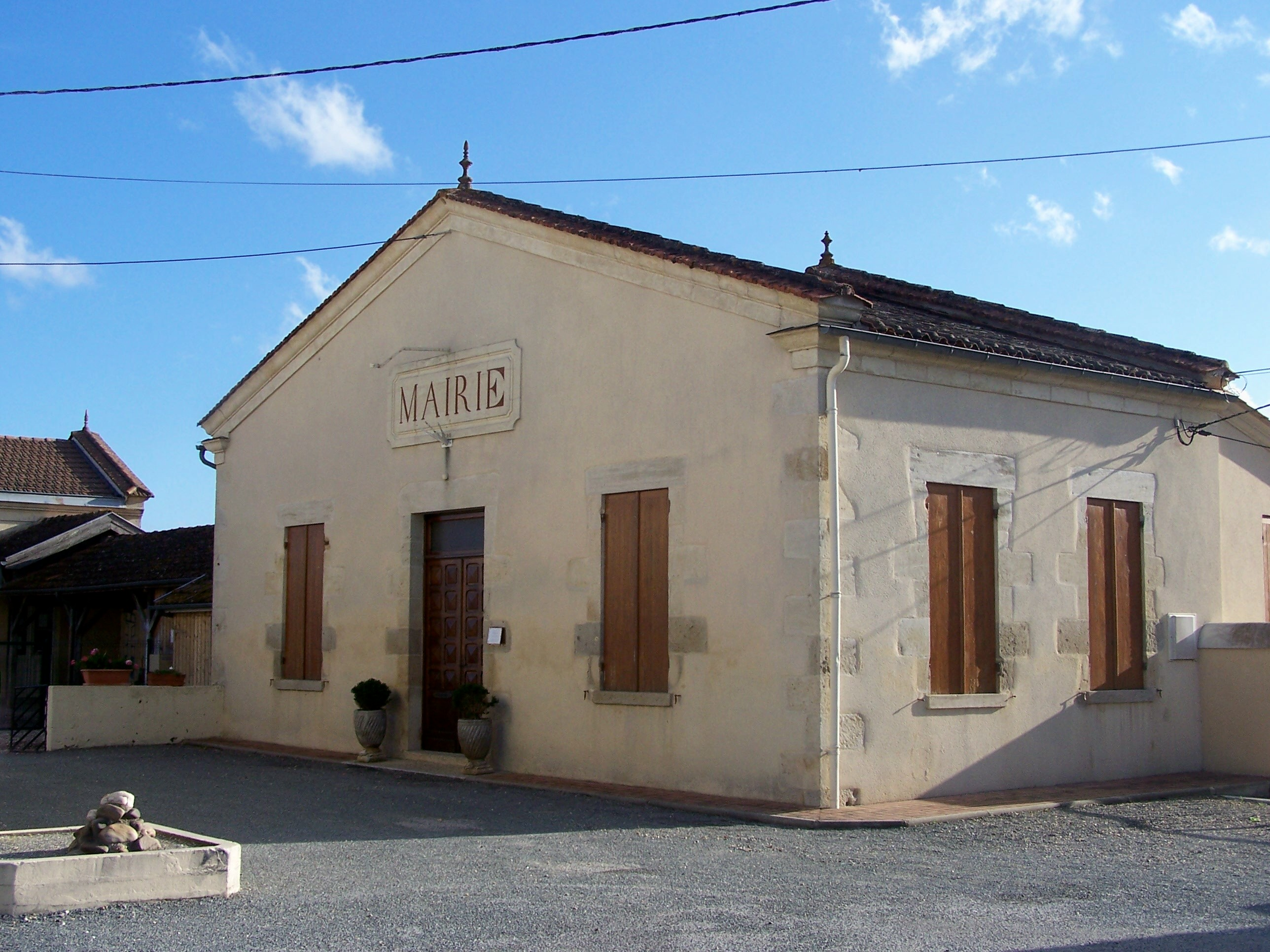 Mairie de Puybarban, Gironde, France